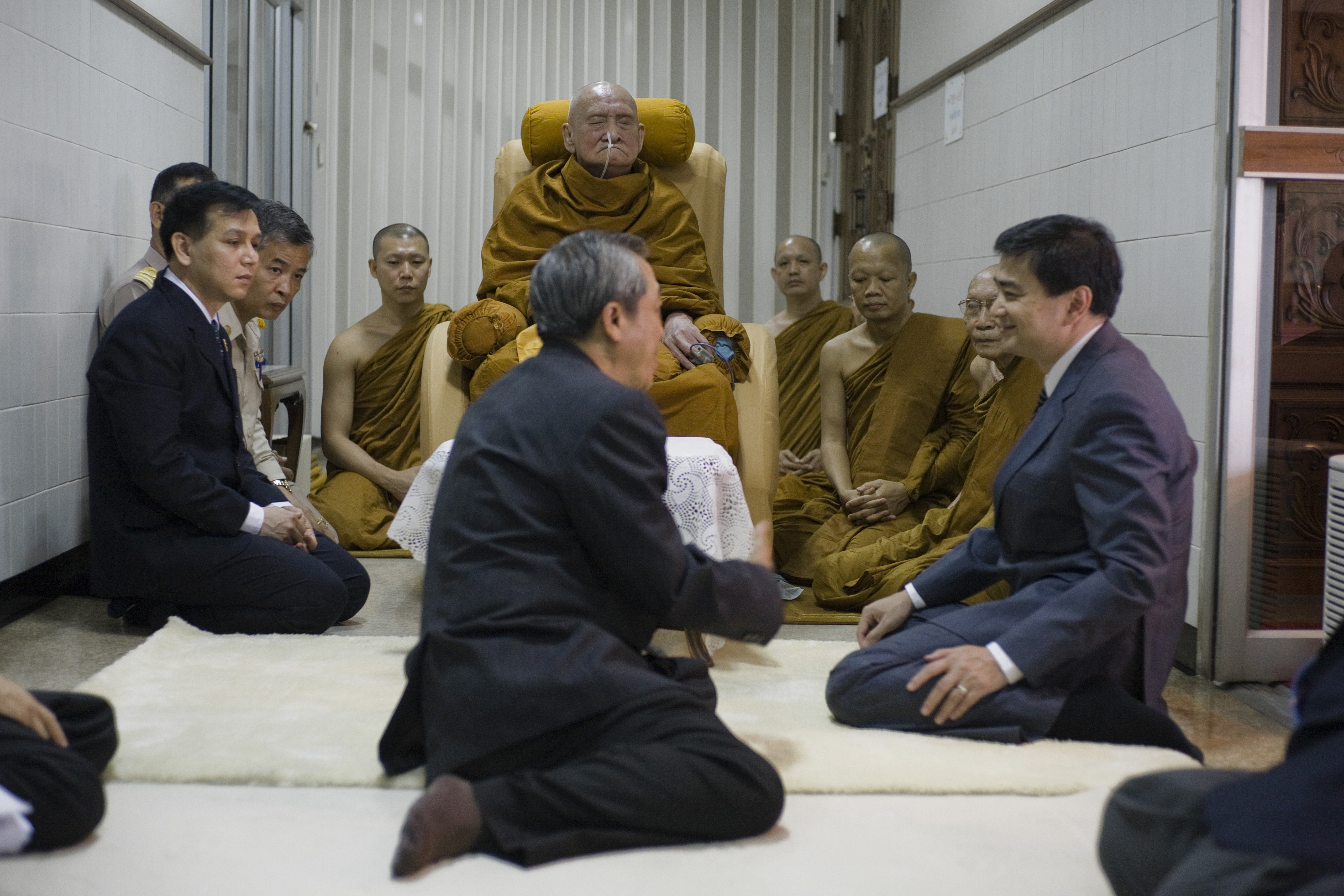 นายกรัฐมนตรี ถวายเครื่องสักการะสมเด็จพระญาณสังวรสมเด็จพระสังฆราช สกลมหาสังฆปริณายก เนื่องในเทศกาลเข้าพรรษาประจำปี 2553 ณ ตึกวชิรญาณ สามัคคีพยาบาล ชั้น 6 โรงพยาบาลจุฬาลงกรณ์ กรุงเทพฯ วันพฤหัสบดี ที่ 29 กรกฏาคม พ.ศ.2553 (Photographer attached to the Prime Minister of the Kingdom of Thailand : Peerapat Wimolrungkarat / พีรพัฒน์ วิมลรังครัตน์)